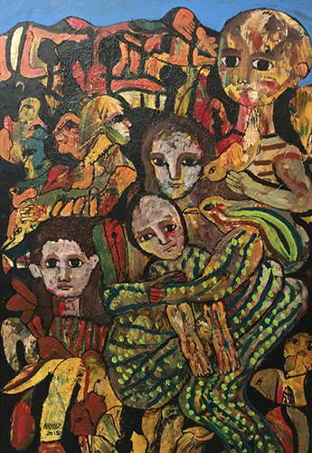 Figura del pintor Félix Aráuz